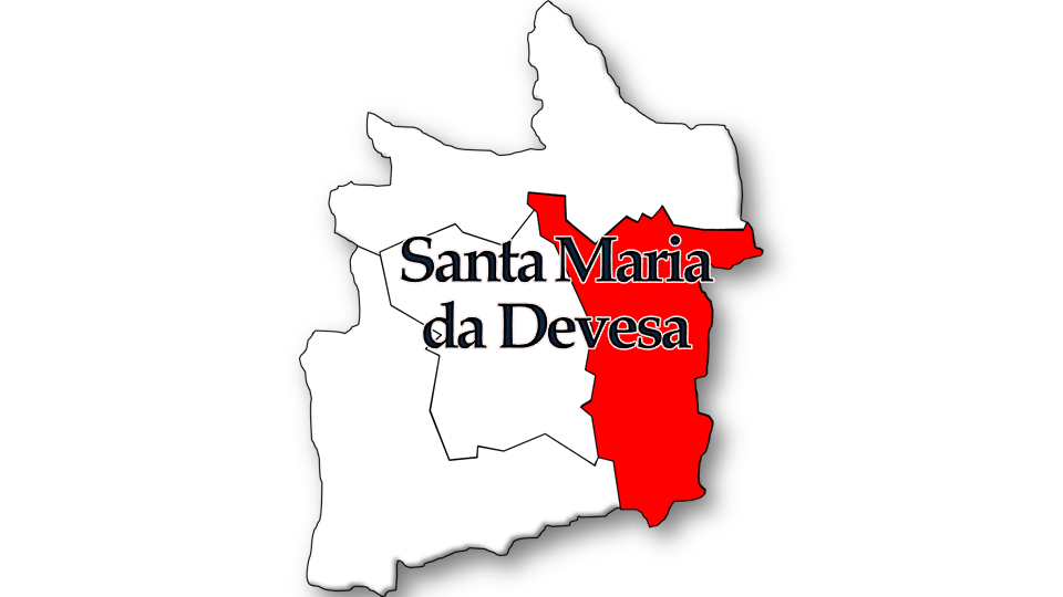 Evolução da População